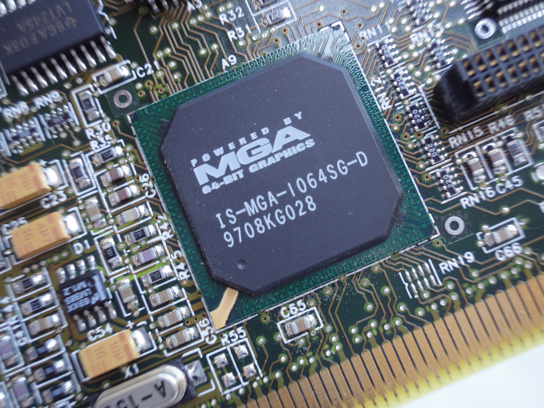 Matrox mga 1064SG